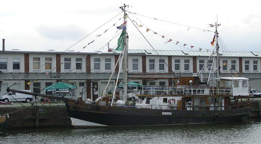 Kutter Wilhelm Peter ehemals KFK 185, aufgenommen im August 2008 im Fischereihafen Bremerhaven.